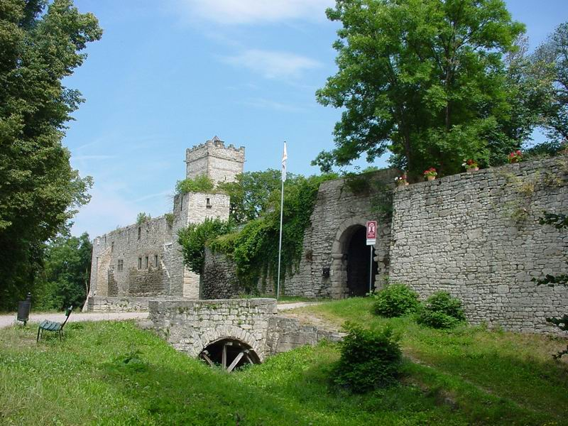 Eckardsburg - Gesamtansicht